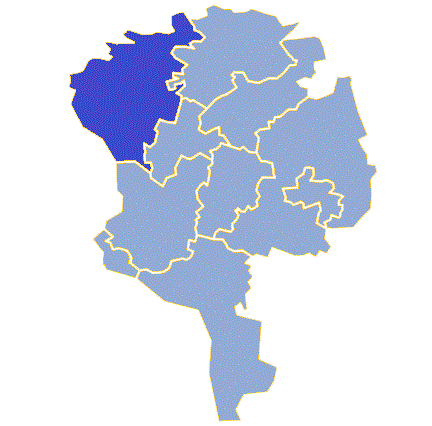 Powiat żarski - Gmina Brody